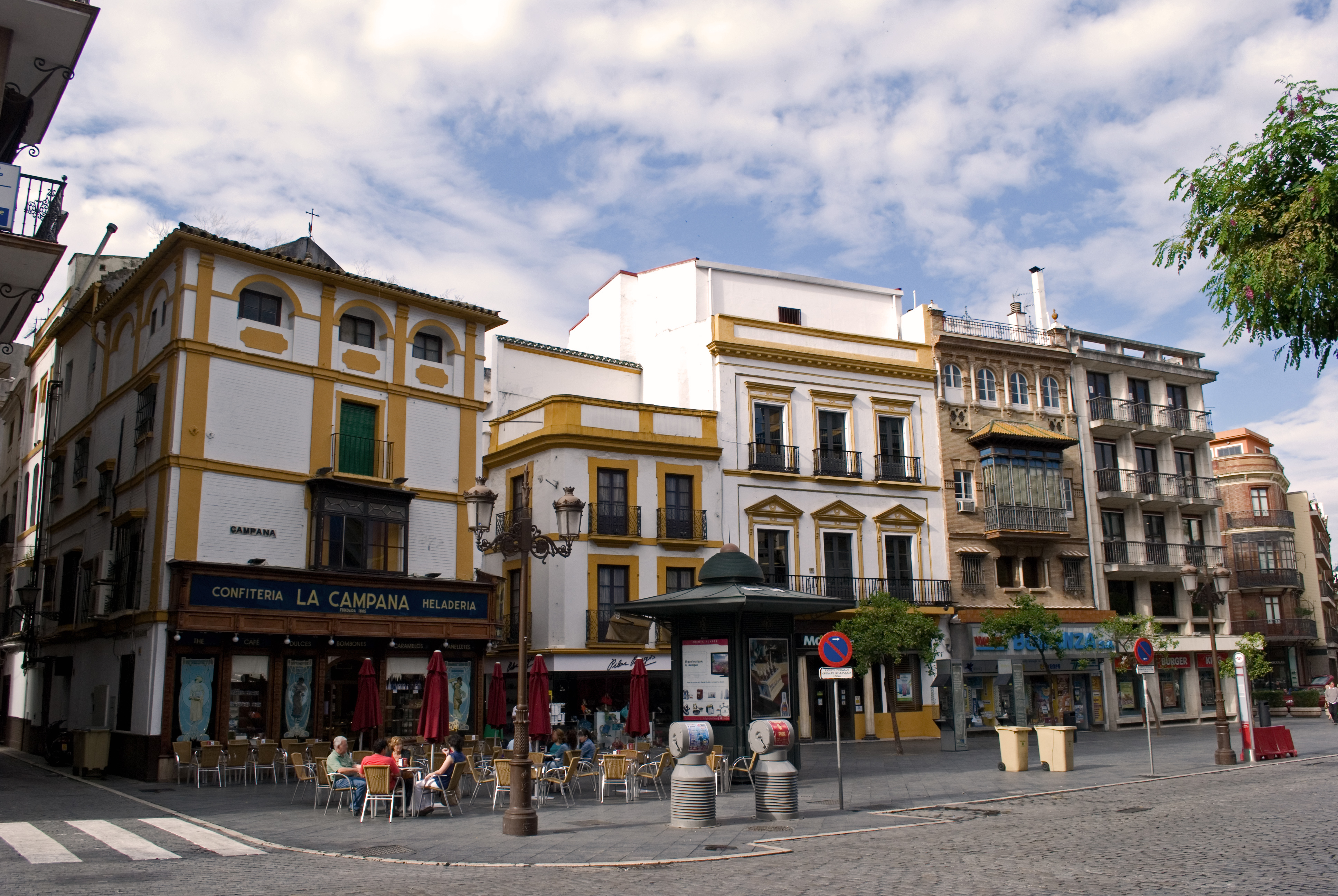 Calle La Campana, Sevilla.